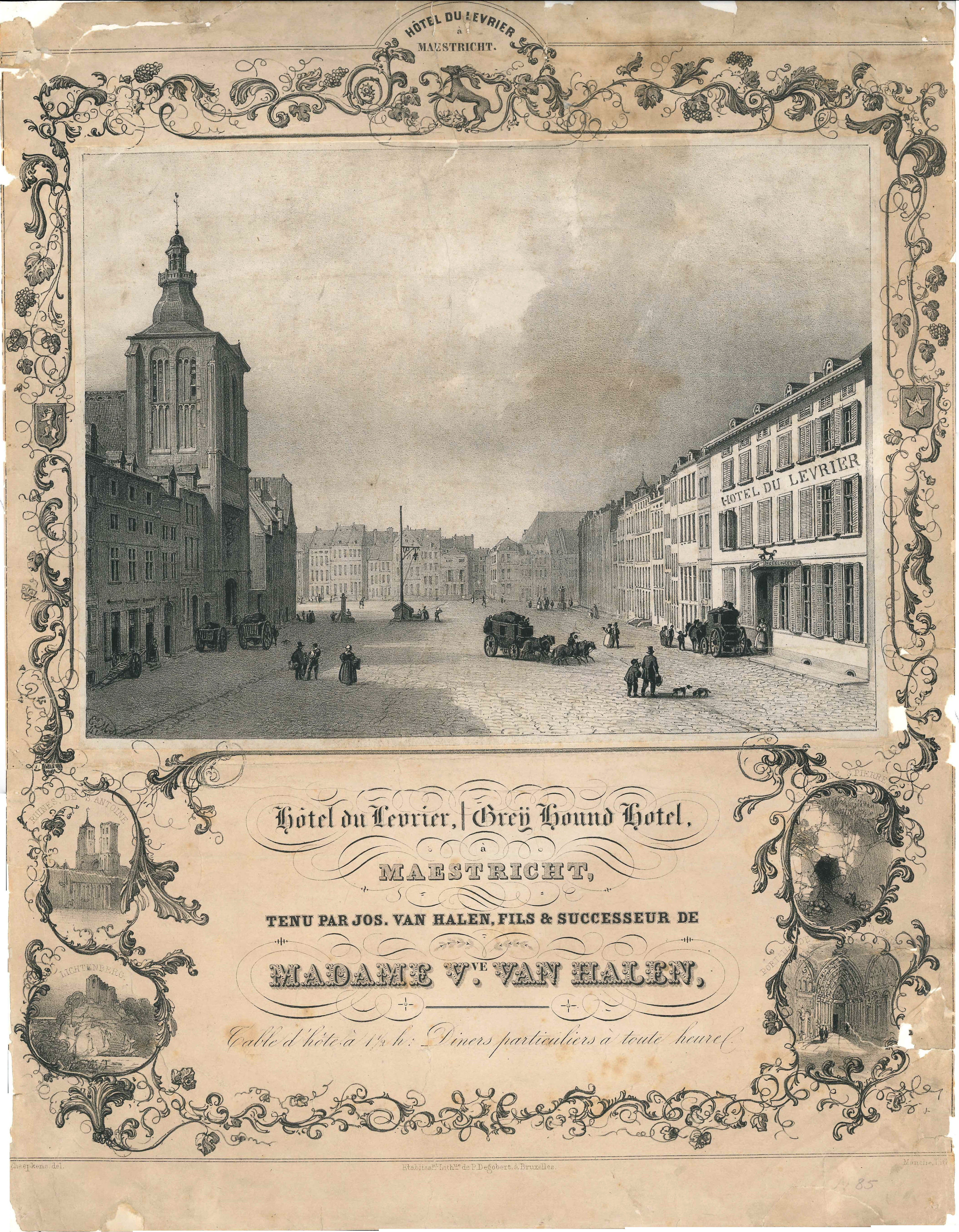 Reclameplaat van het Hôtel du Levrier / Grey Hound Hotel te Maastricht. "Tenu par Jos. van Halen, fils et successeur de Madame Ve. Van Halen". De lithografieën van Alexander Schaepkens tonen: gezicht op de Boschstraat en Markt met links de Sint Matthiaskerk. Aan de zijkanten vier medaillons met: de ruïne van de Antonietenkerk, de ruïne Lichtenberg, ingang van de grotten van de Sint-Pietersberg en het Bergportaal van de Sint-Servaaskerk. Collectie RHCL Maastricht, RAL P-0085-01.